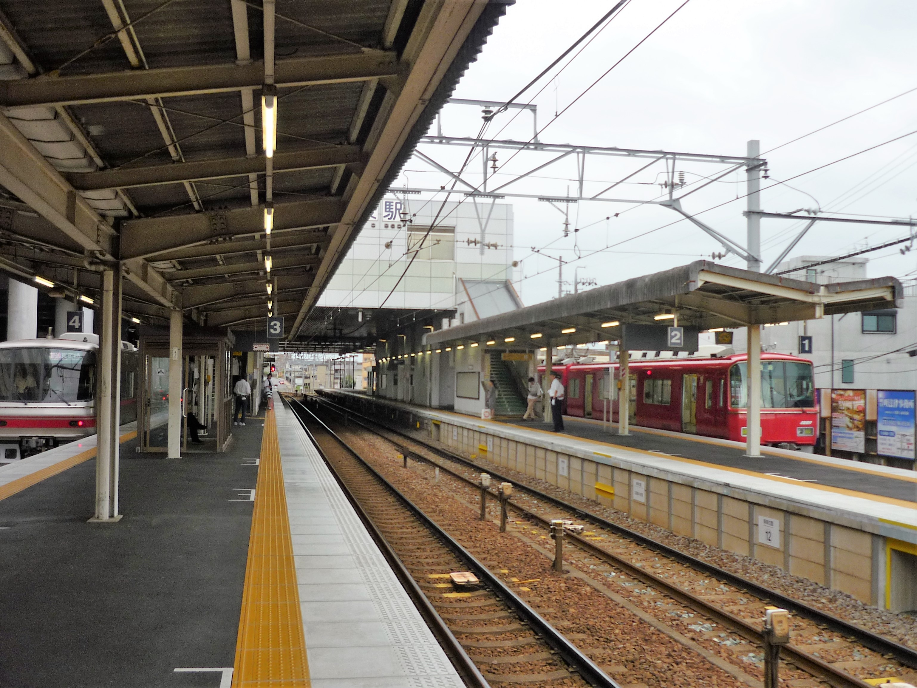 前後駅プラットホーム Panasonic Lumix DMC-FS3